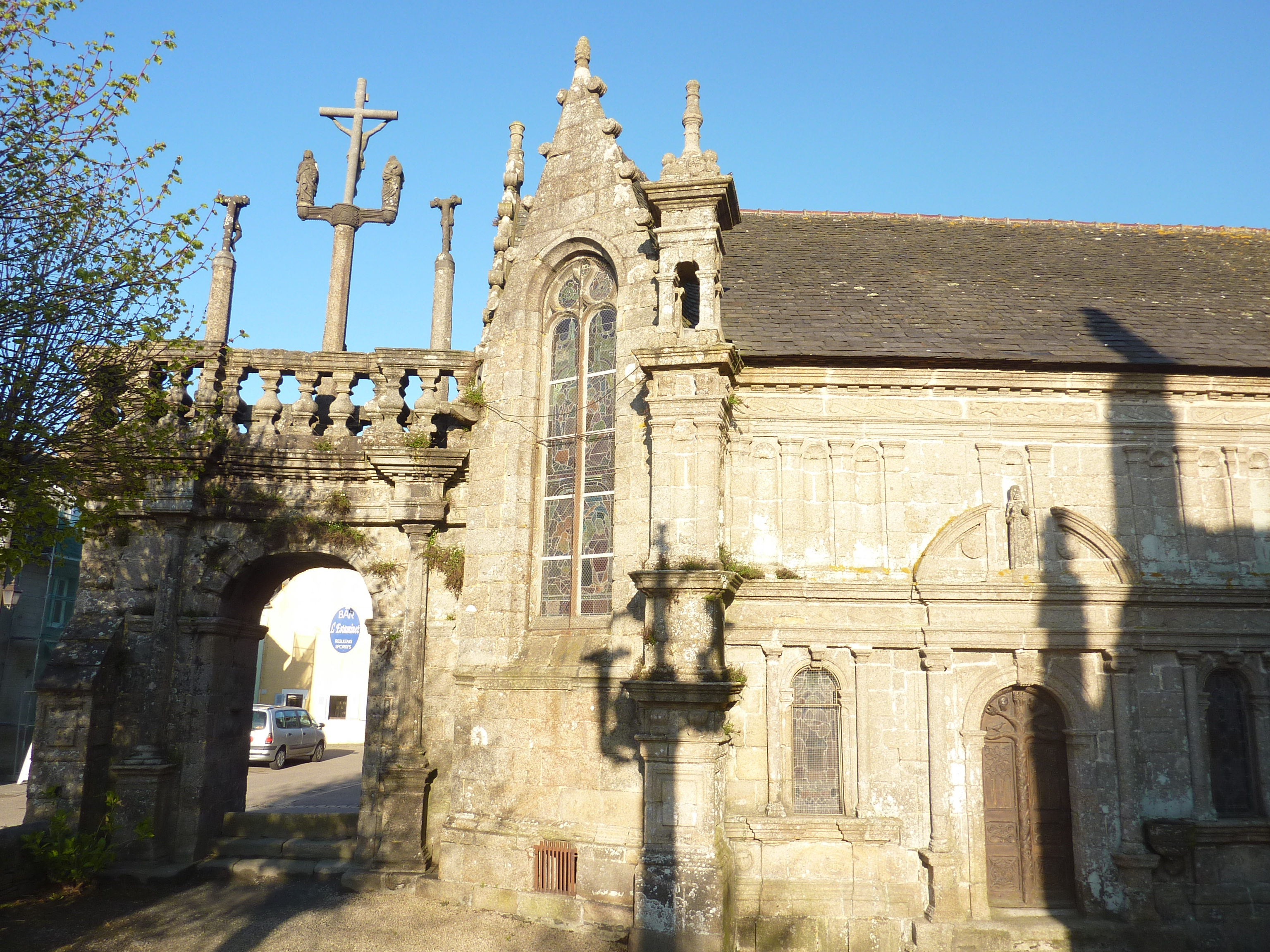 Lampaul-Guimiliau : enclos paroissial, porte triomphale et ossuaire